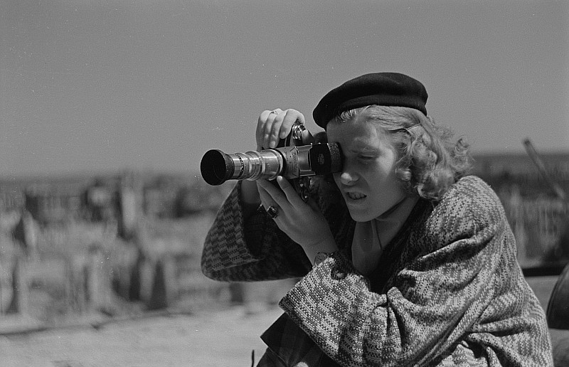 Original image description from the Deutsche FotothekRenate Rössing mit beim Fotografieren vor Gebäudetrümmern